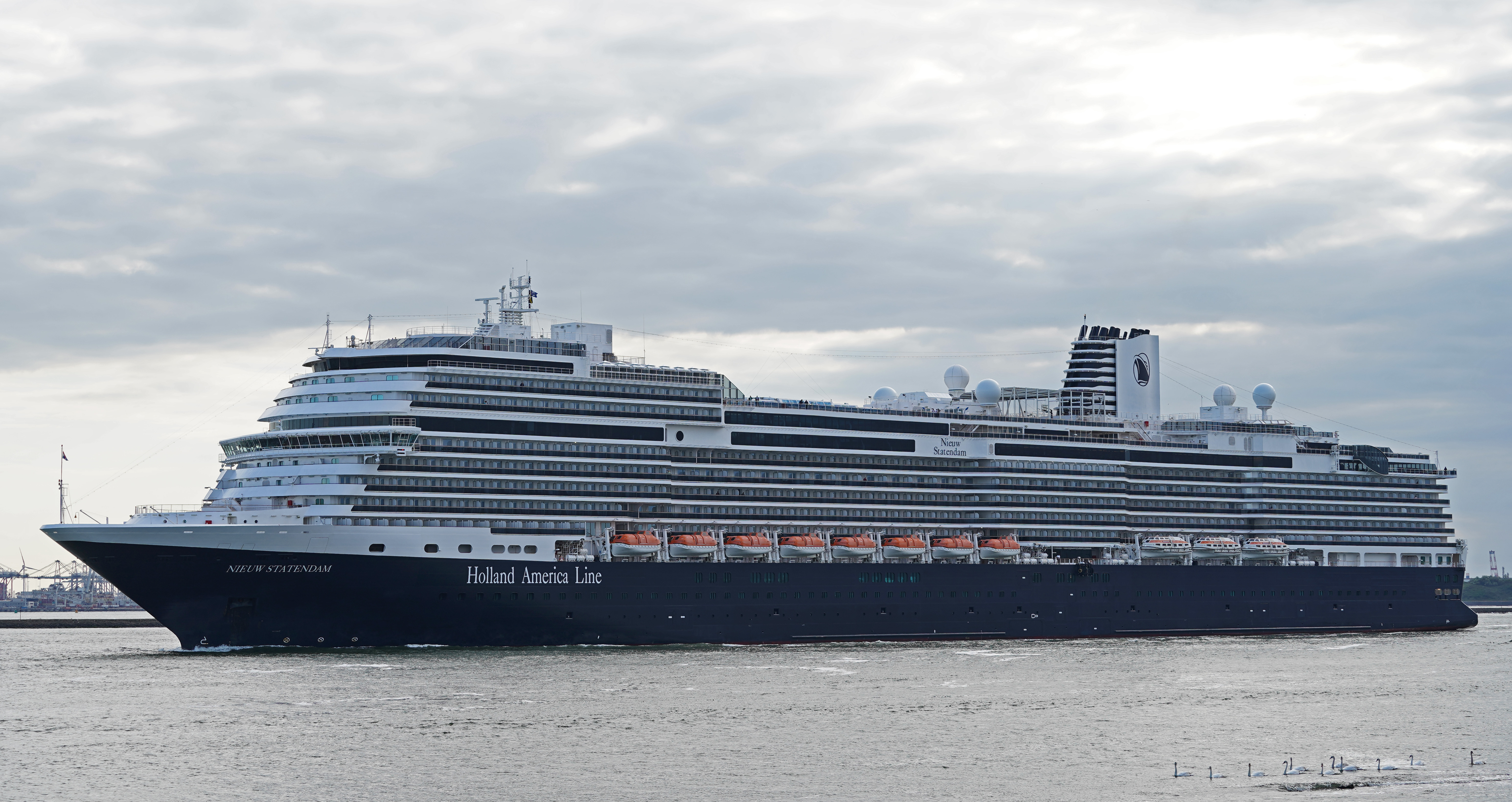 Hoek van Holland 12-5-2020